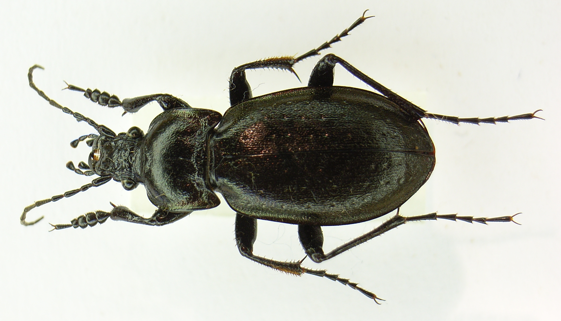 Carabus nemoralis, male